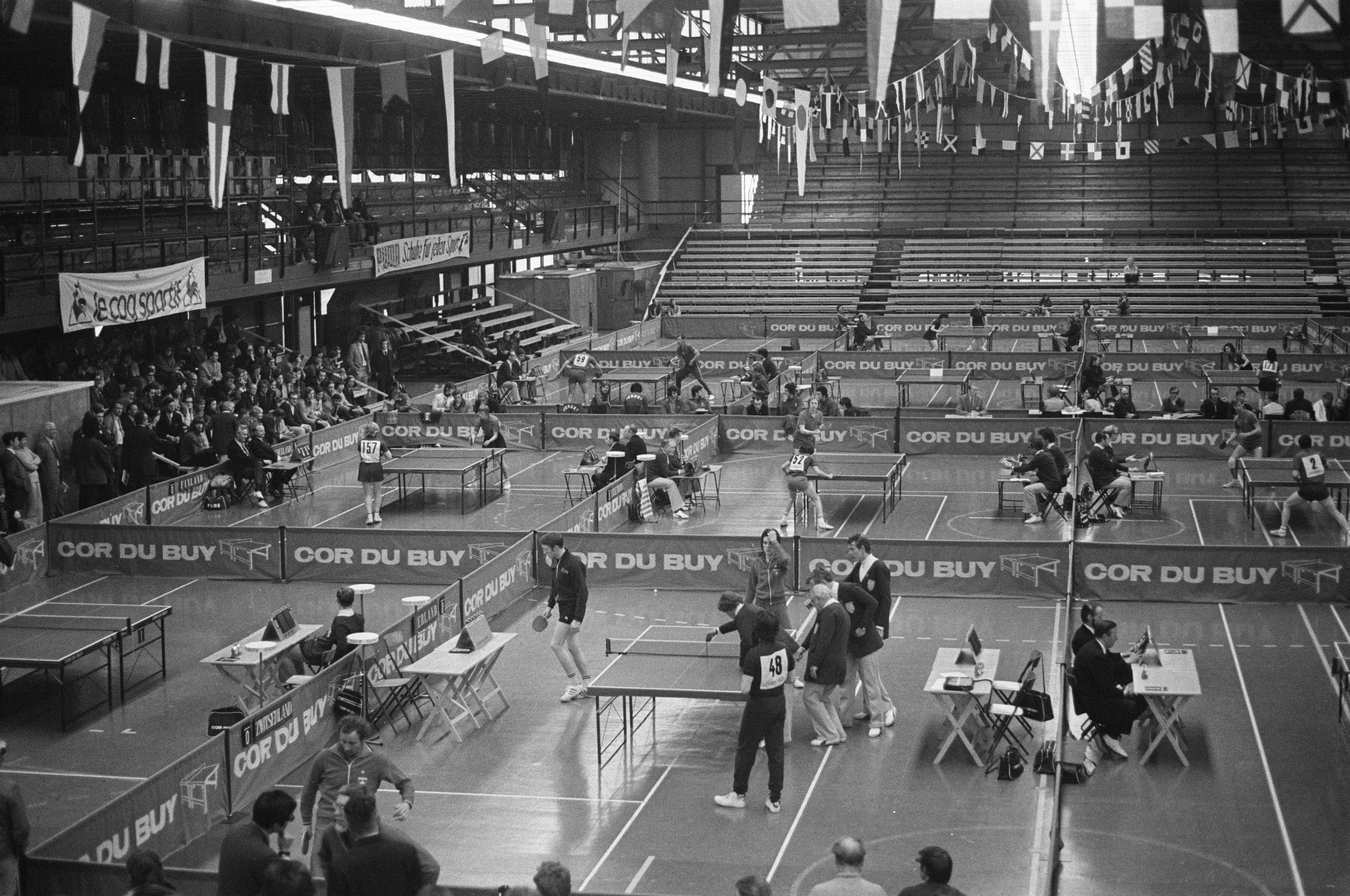 Collectie / Archief : Fotocollectie Anefo Reportage / Serie : [ onbekend ] Beschrijving : Europese tafeltenniskampioenschappen in Energiehal te Rotterdam; overzicht Datum : 15 april 1972 Locatie : Rotterdam, Zuid-Holland Trefwoorden : Tafeltennis, kampioenschappen, overzichten Fotograaf : Peters, Hans / Anefo Auteursrechthebbende : Nationaal Archief Materiaalsoort : Negatief (zwart/wit) Nummer archiefinventaris : bekijk toegang 2.24.01.05 Bestanddeelnummer : 925-5277